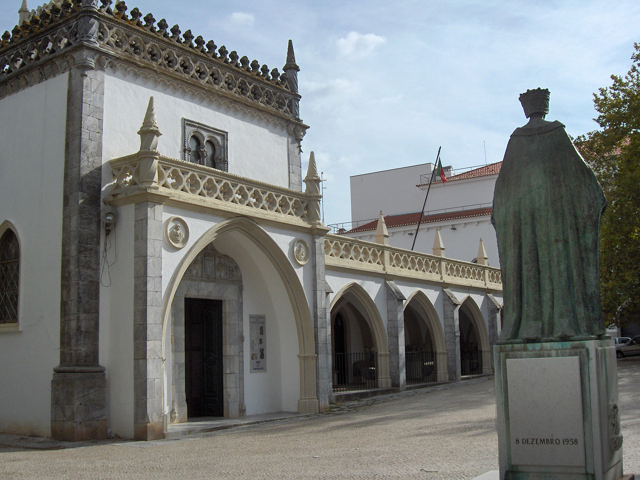 Façade of the Museu da Reinha D. Leonor; Beja, Portugal; Statue of Dona Leonor by Álvaro de Brée